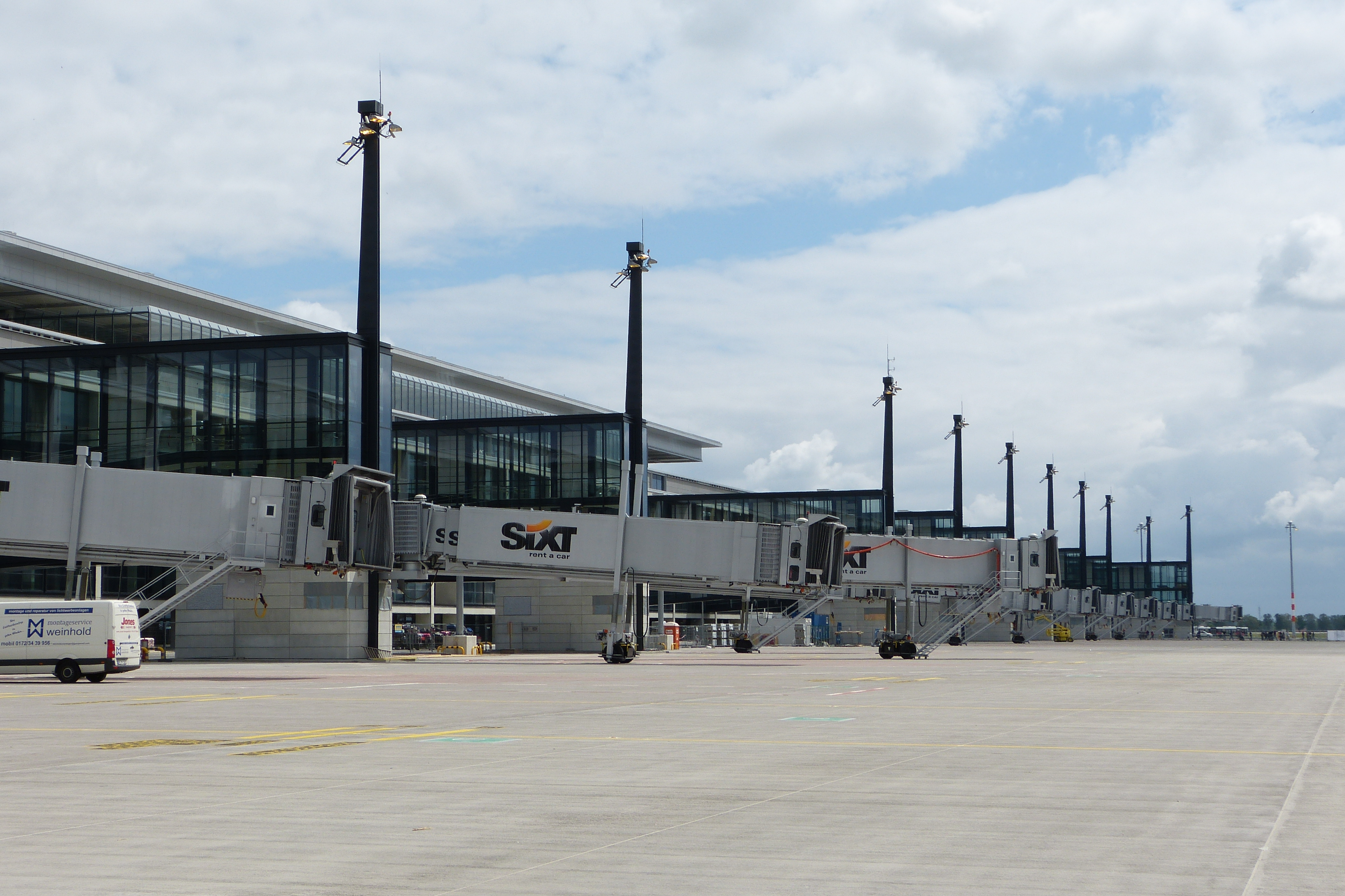 Flughafen Berlin-Brandenburg, Flugbrücken